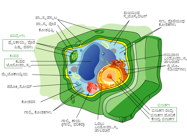 ಕನ್ನಡ: ಮಾದರಿ ಸಸ್ಯ ಜೀವಕೋಶದ ರಚನೆ